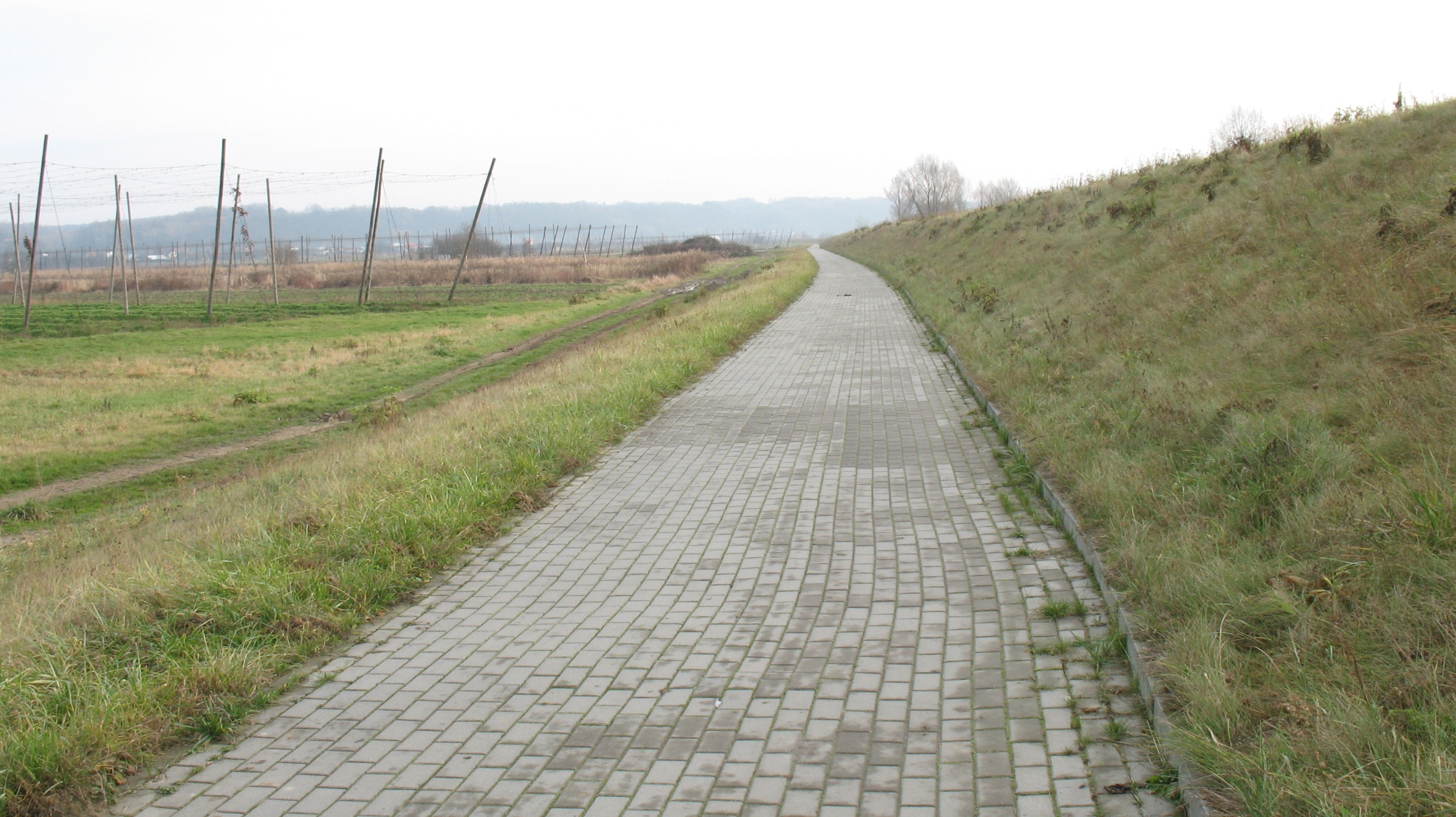 Droga rowerowa stanowiąca zachodnią obwodnicę Włostowic o długości 6.5 km.